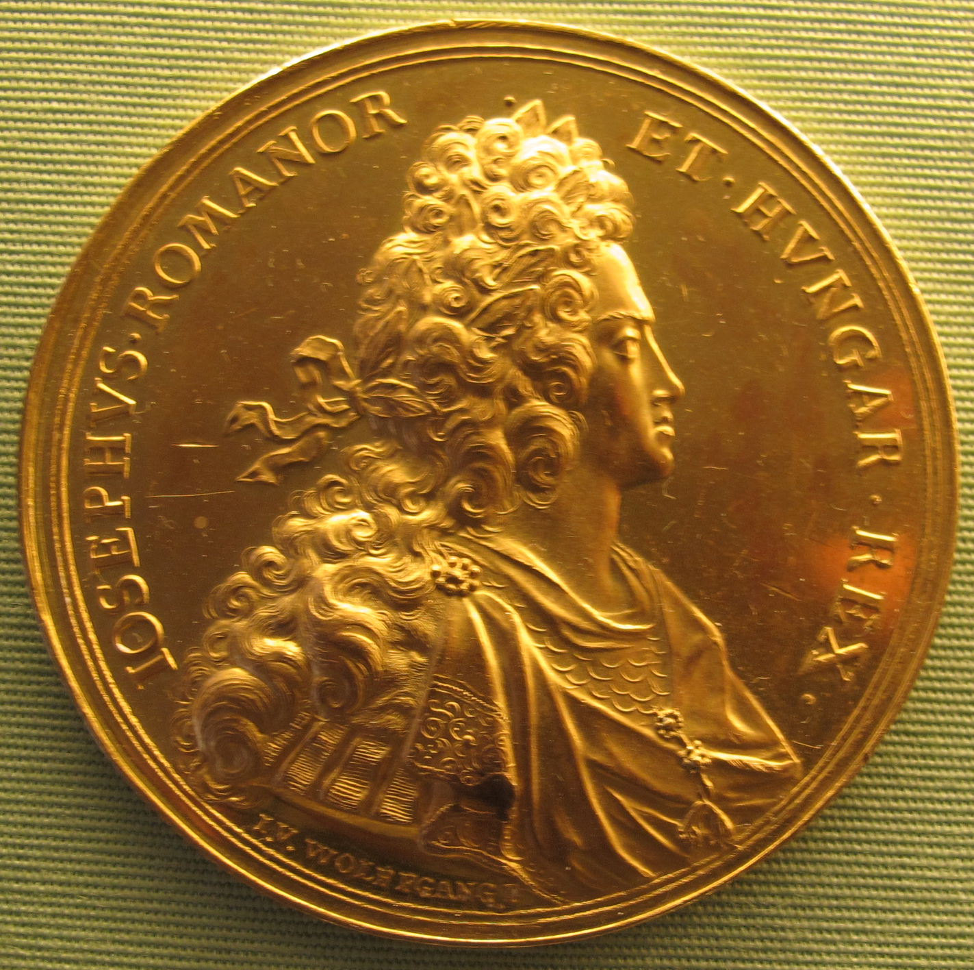 I.v. wolfgang, giuseppe I, 1700